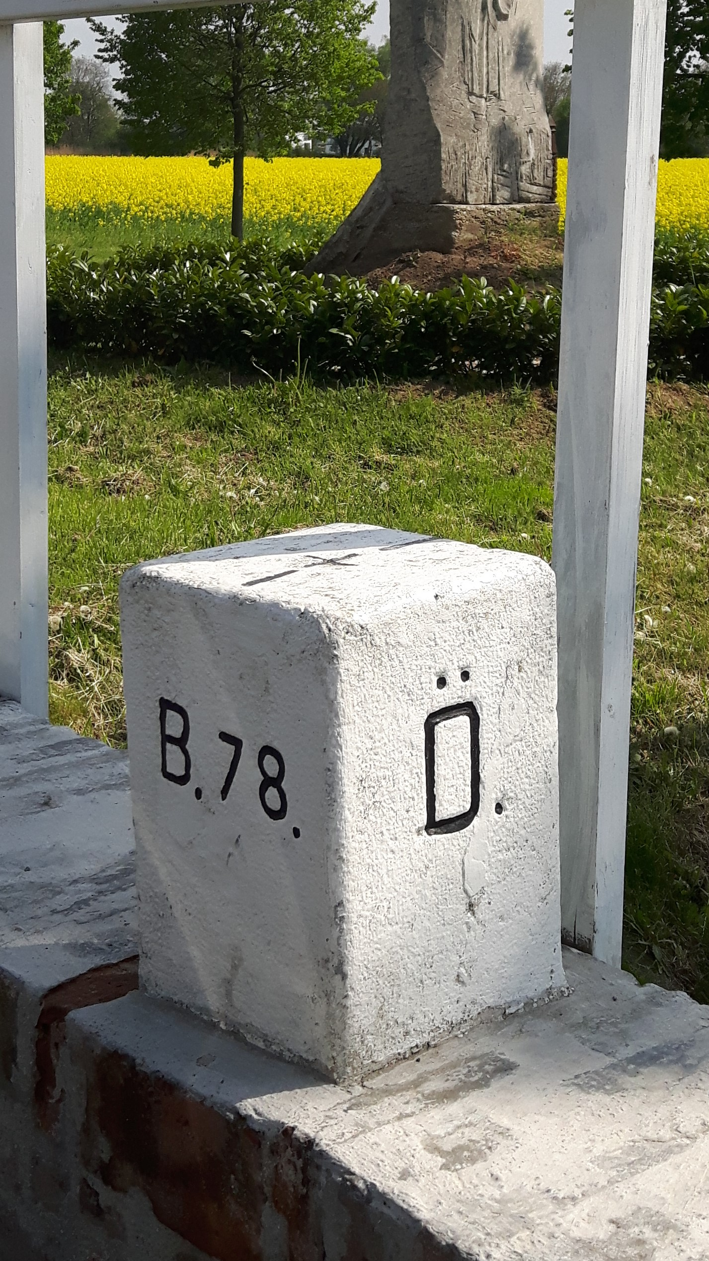 Grenzstein österreichisches Grenzgebiet